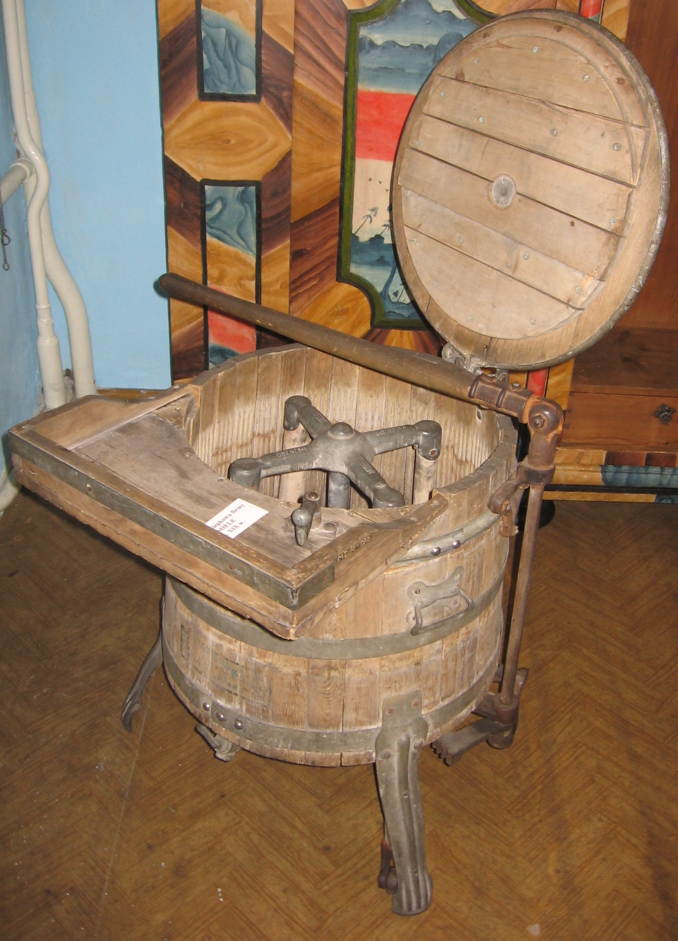 pralka klepkowa firmy MIELE z XIX wieku ze zbiorów Muzeum Gospodarstwa Domowego w Ziębicach